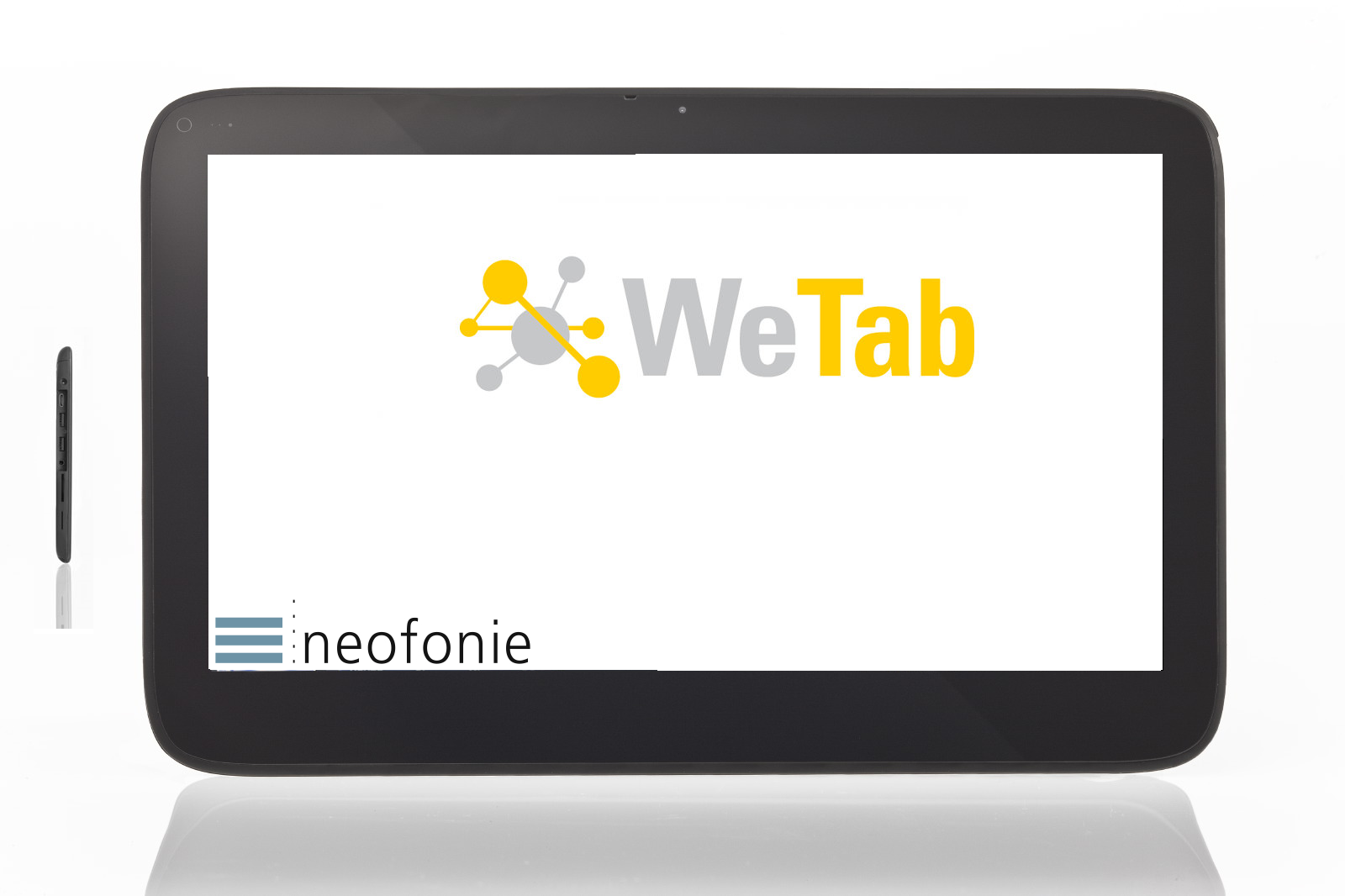 Das WeTab von neofonie.